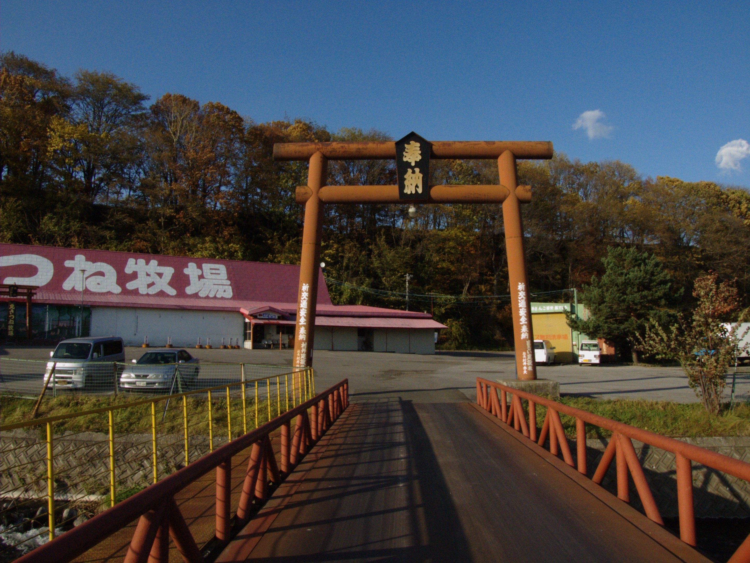 北きつね牧場。留辺蘂（るべしべ）、温根湯（おんね湯）温泉。北海道北見市。